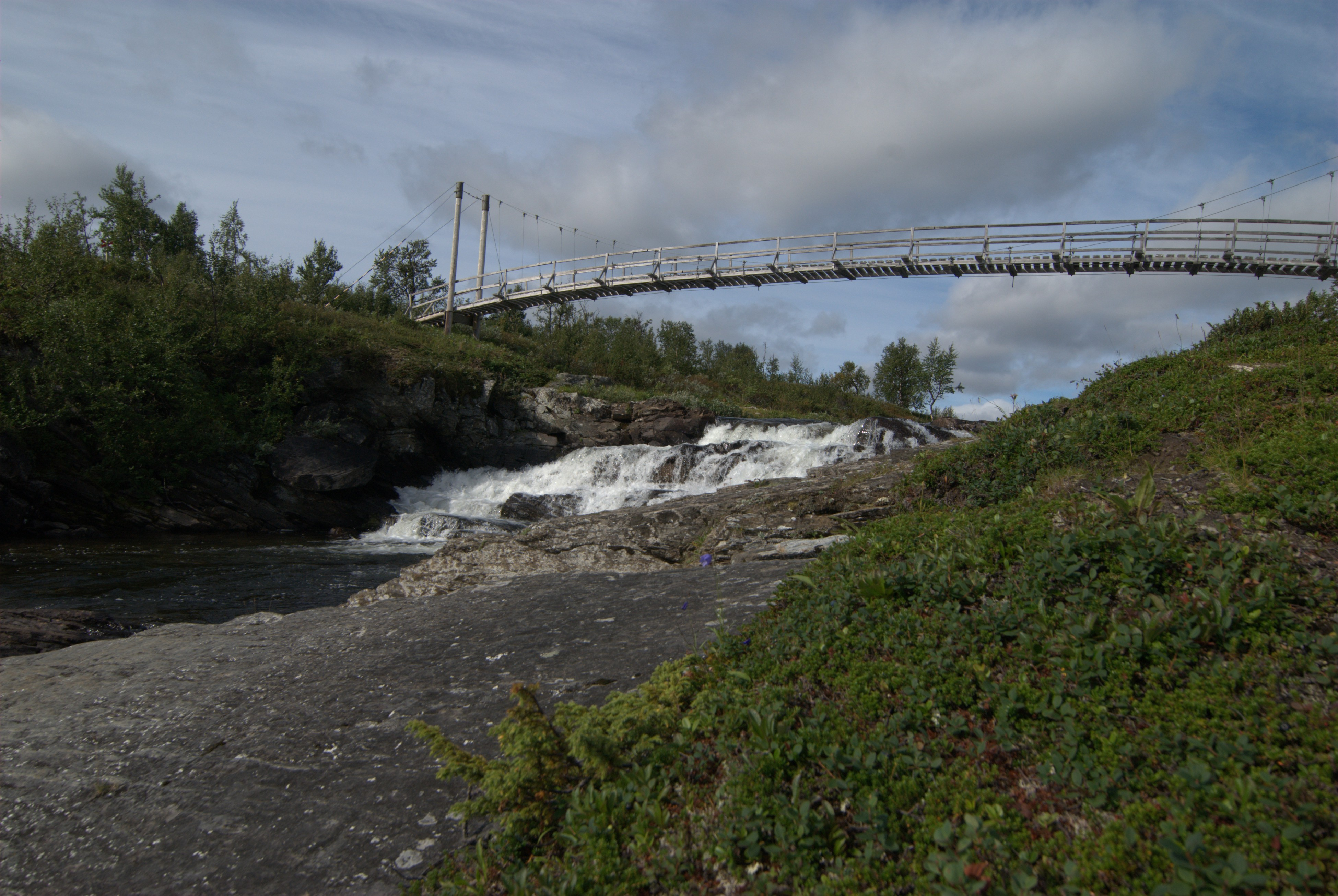 Suspension bridge over Servvejuhka, Kungsleden trail, Vindelfjällen.